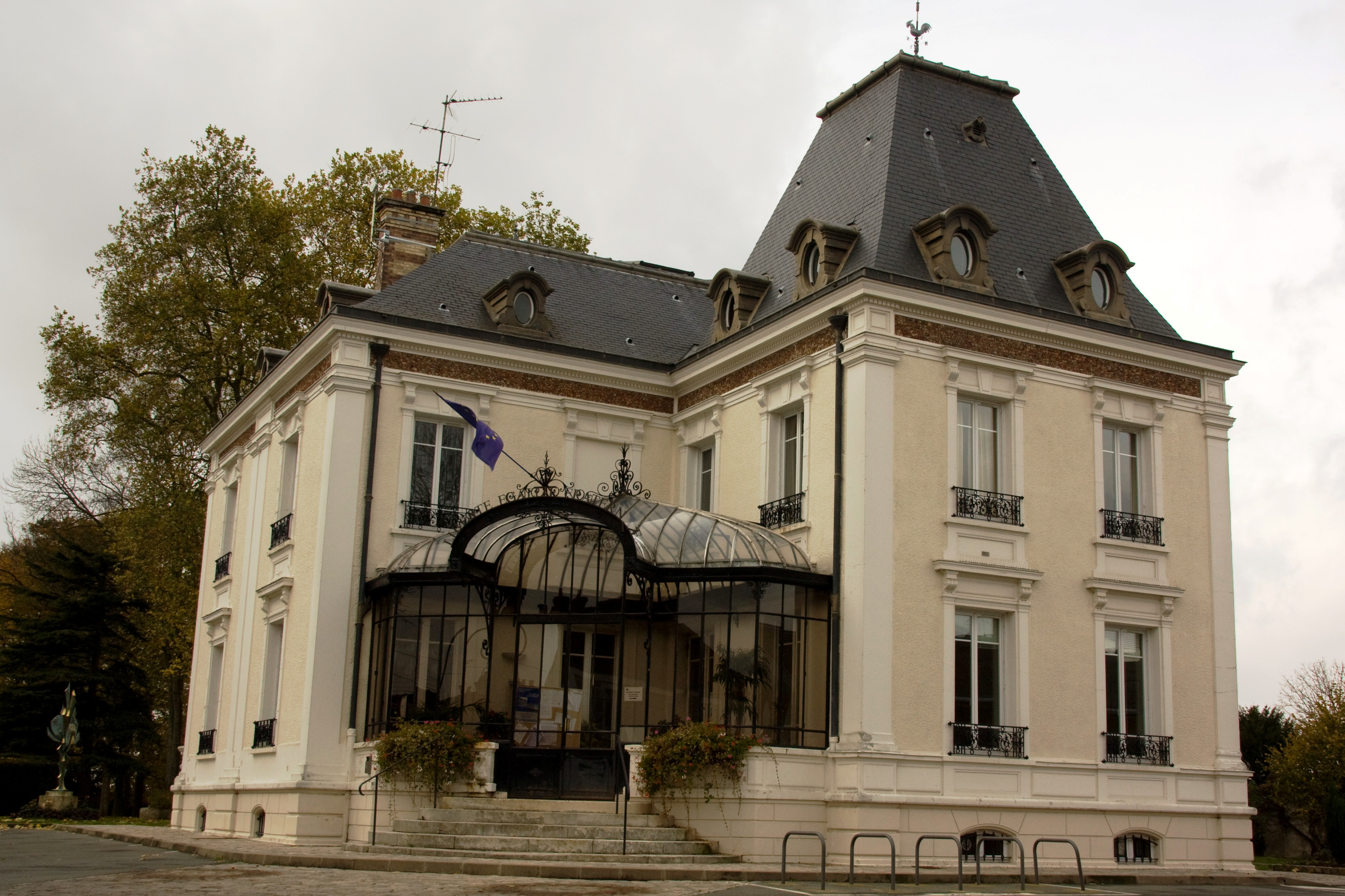 Mairie de Lisses, Essonne, France.